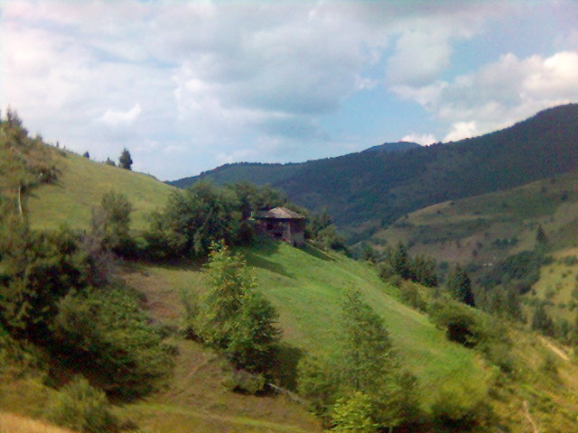 Изглед от с. Богутево, област Смолян